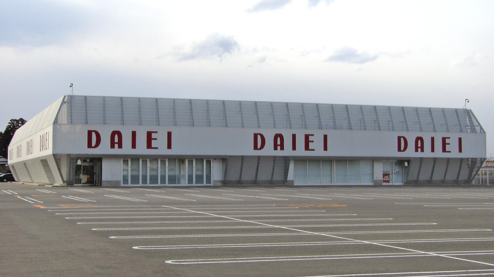 ダイエー原町店